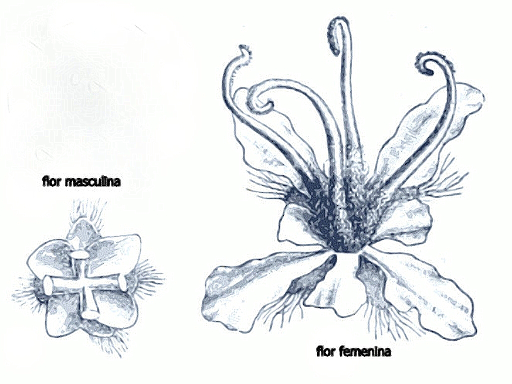 Platanus x hispanica (Platano de sombra) : Flores femenina y masculina (muy aumentado).